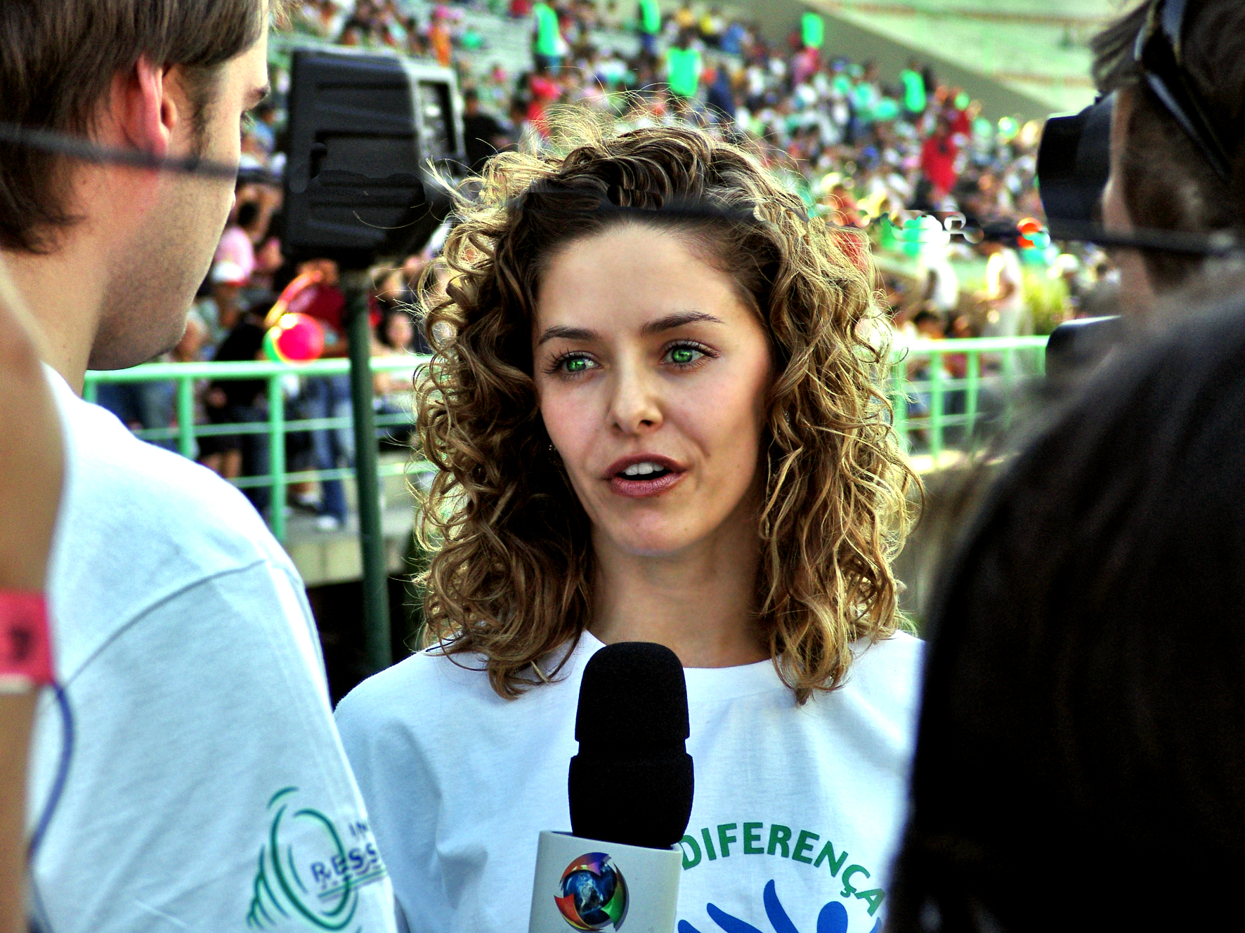 Bianca Rinaldi